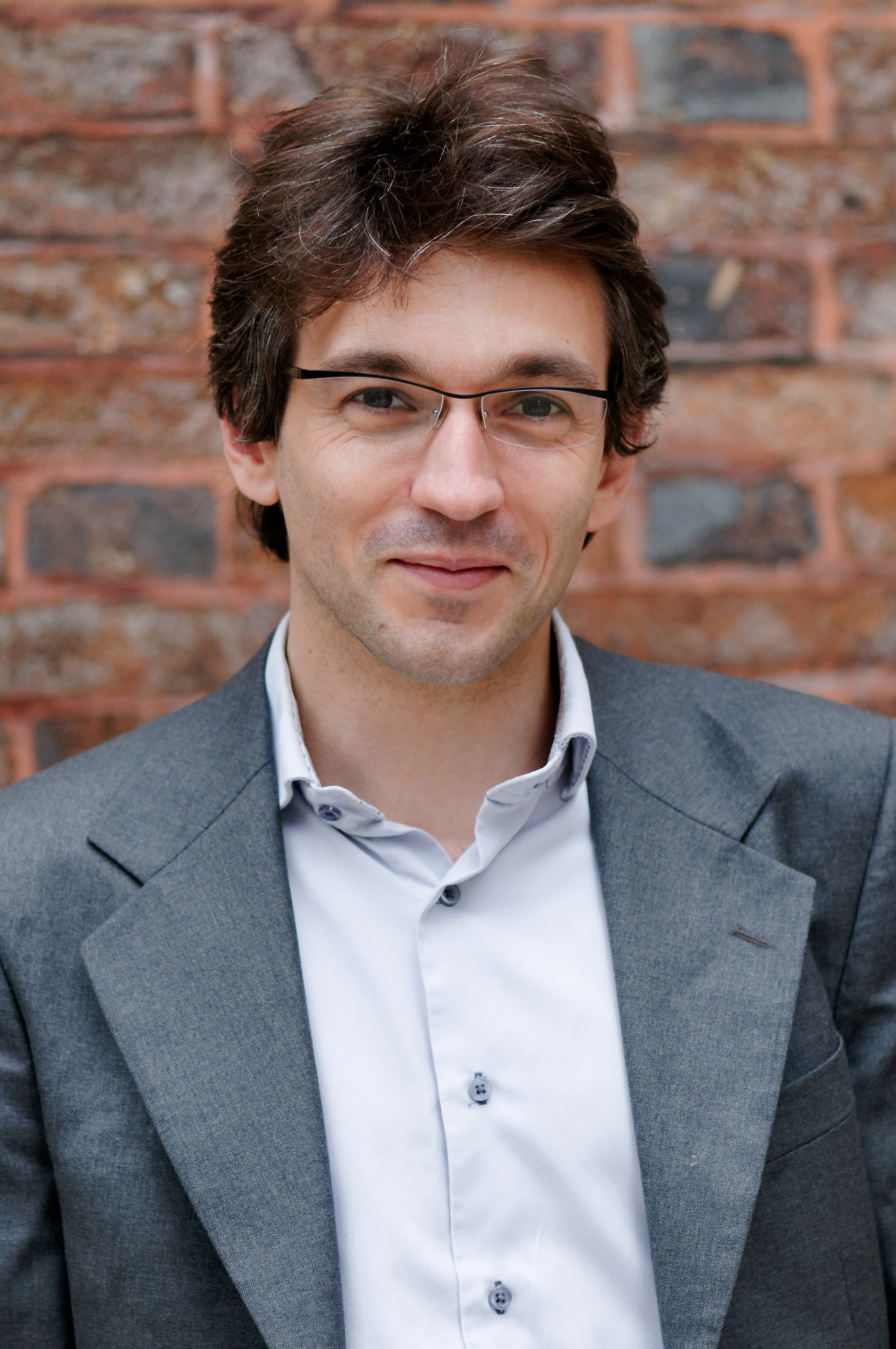 Portrait de Rémi Mathis. Photo prise sur le site Richelieu de la Bibliothèque nationale de France.